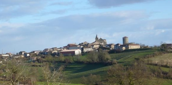 Monclar (lot et garonne)